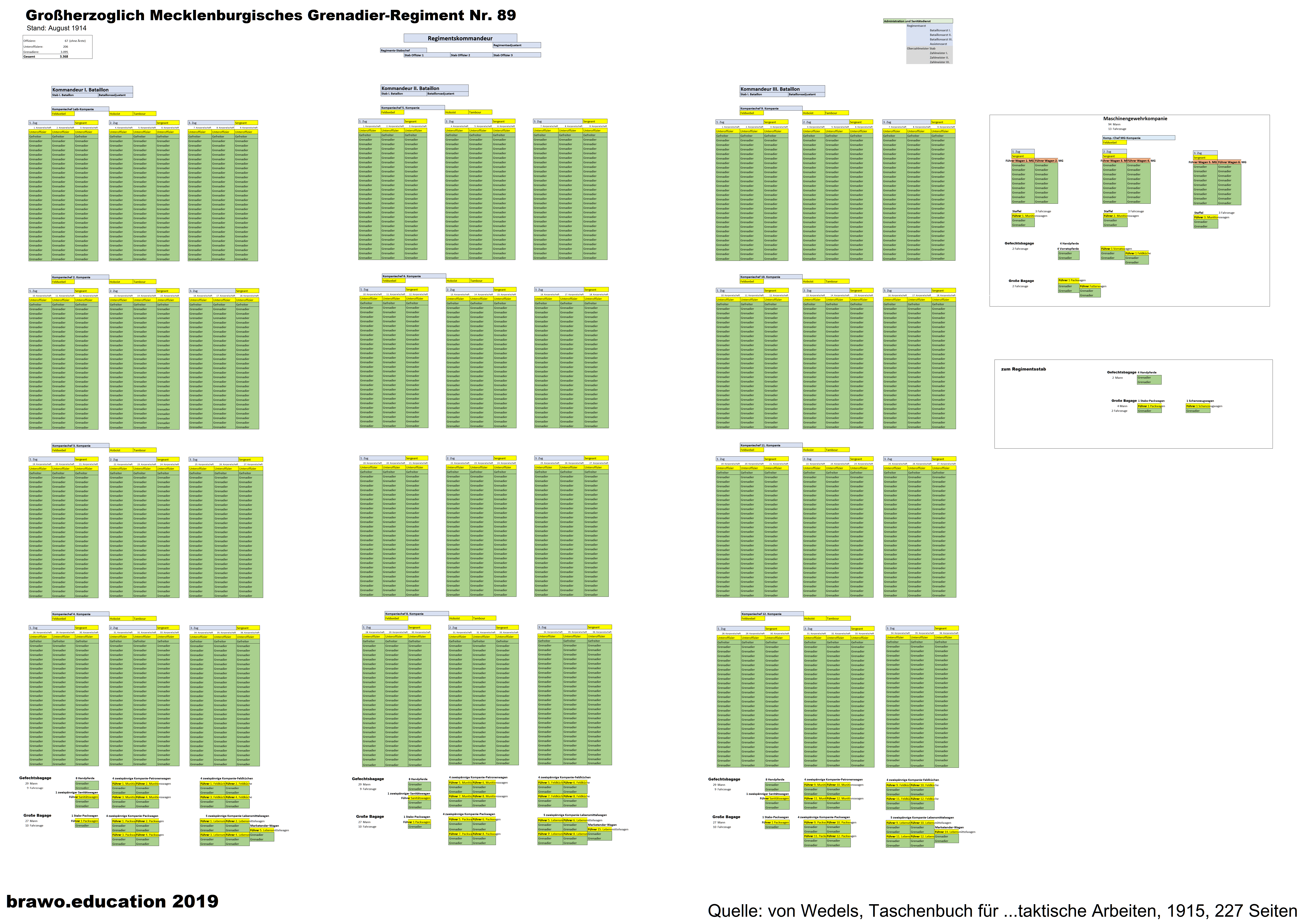 Die wahrscheinliche Struktur des Grenadier-Regiments Nr. 89 bis hinunter in die Korporalschaften - Gerhard Düker, Fritz Langner - Ein Neustädter an der Front - Juni 2019, 338 Seiten